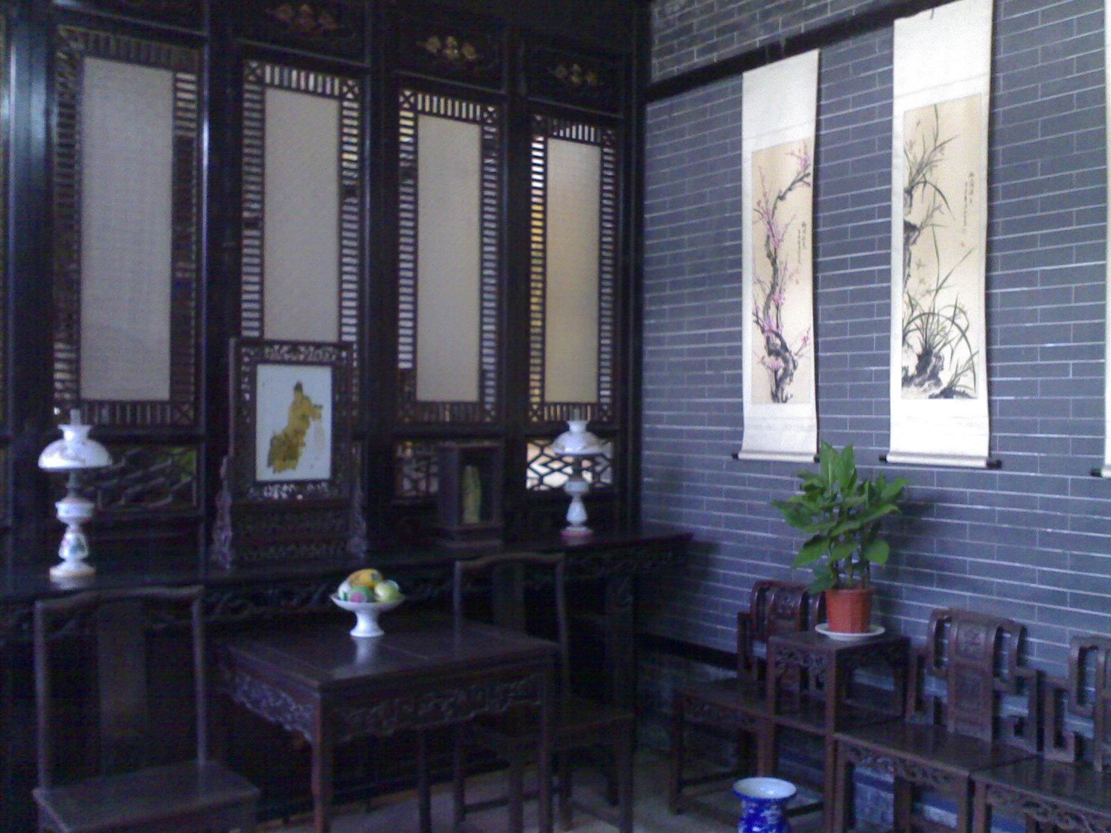 西关大屋的客厅